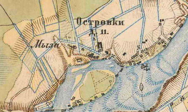 План деревни Островки. 1885 г.